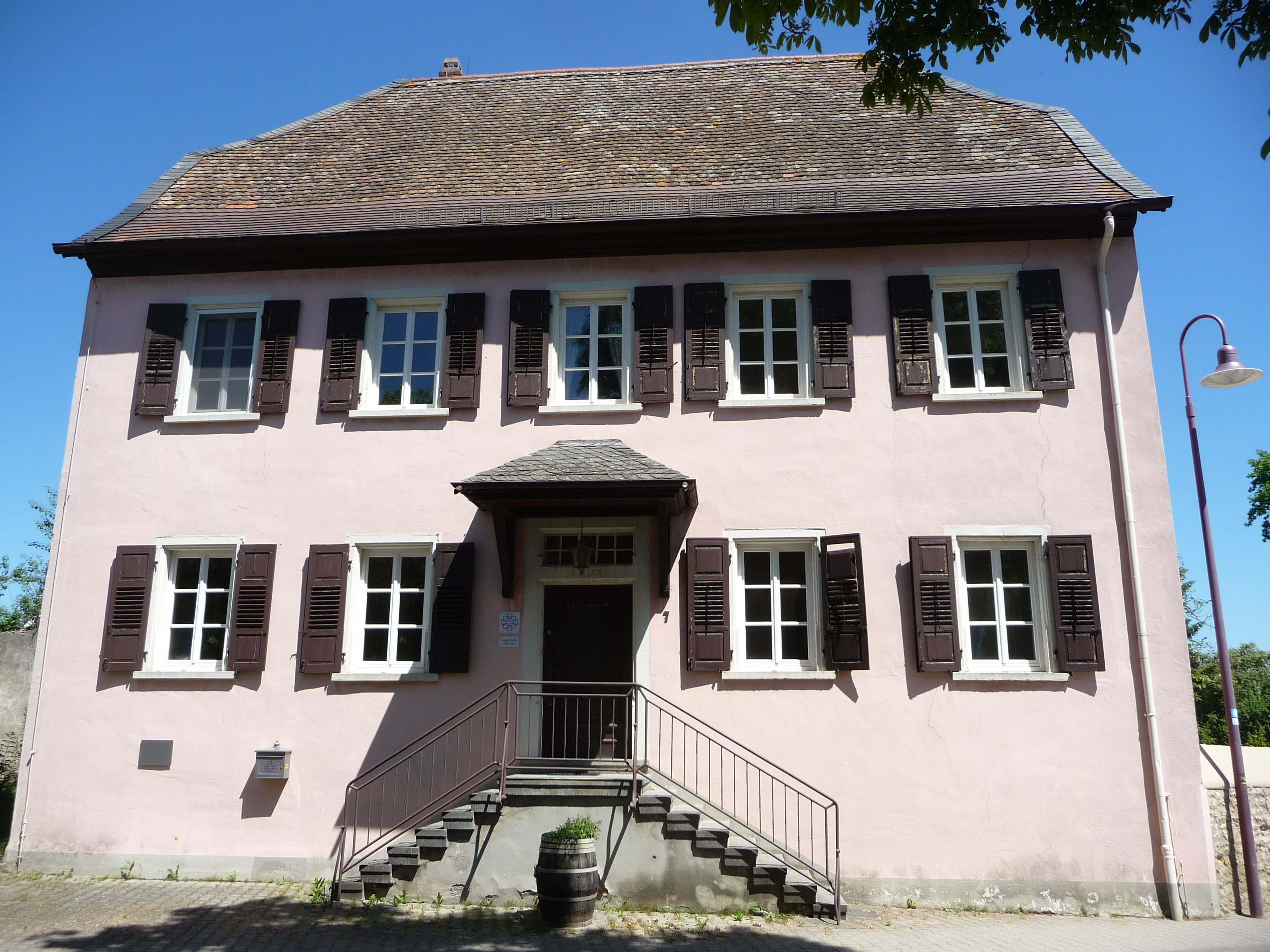 Dittelsheim-Heßloch ist eine Ortsgemeinde im Landkreis Alzey-Worms in Rheinland-Pfalz.